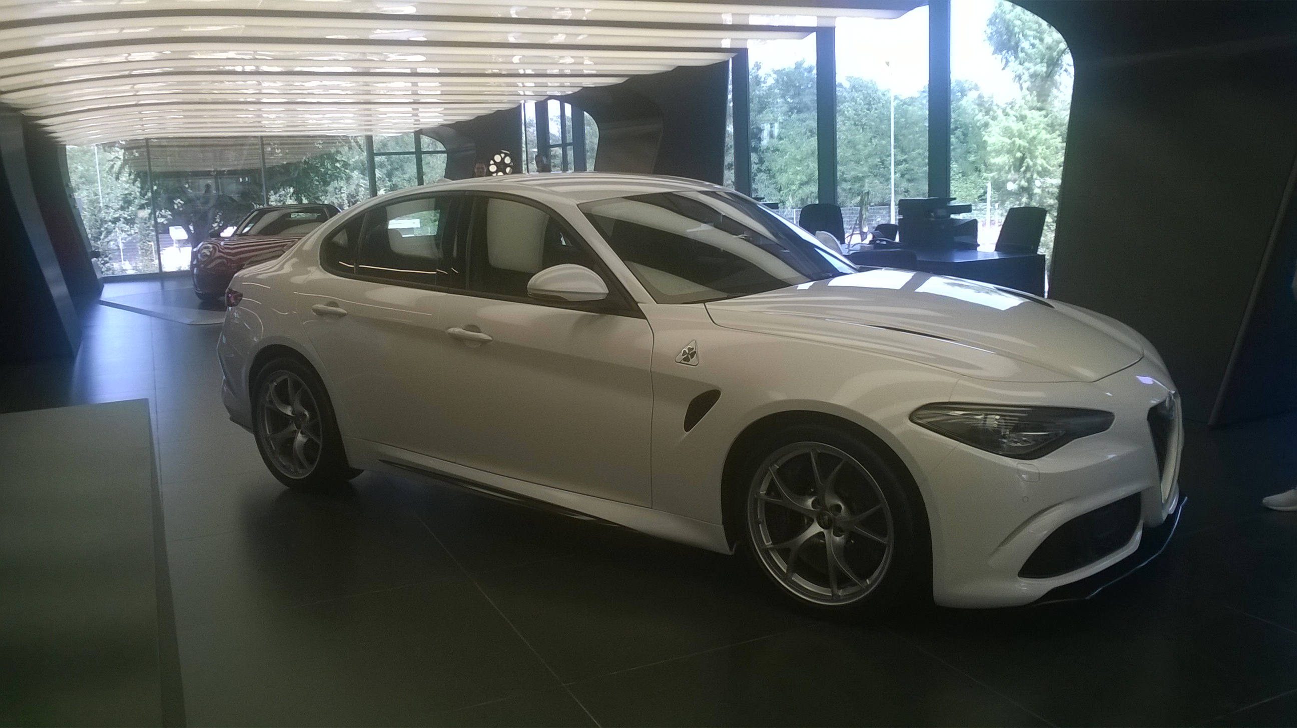 L' Alfa Romeo QV preserie bianca esposta ad Arese nel museo Storico Alfa Romeo in occasione dei 105 anni